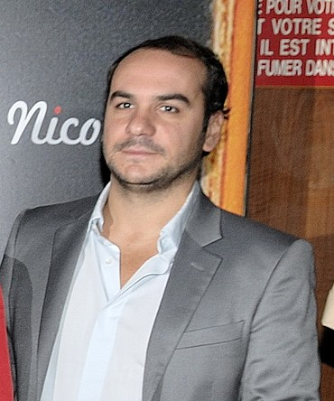 Avant-première du film Le Petit Nicolas au Grand Rex, à Paris, le 20 Septembre 2009, en présence de toute l'équipe de film. Ici, François-Xavier Demaison.